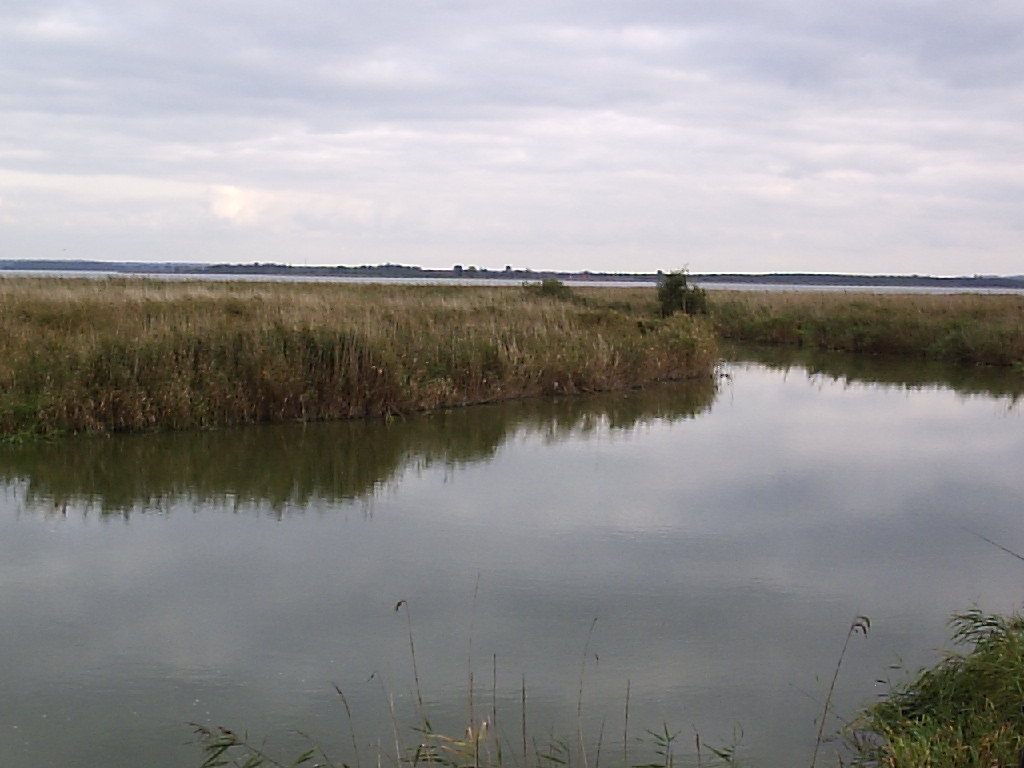 Kanał łączący jezioro Jamno z Morzem Bałtyckim.